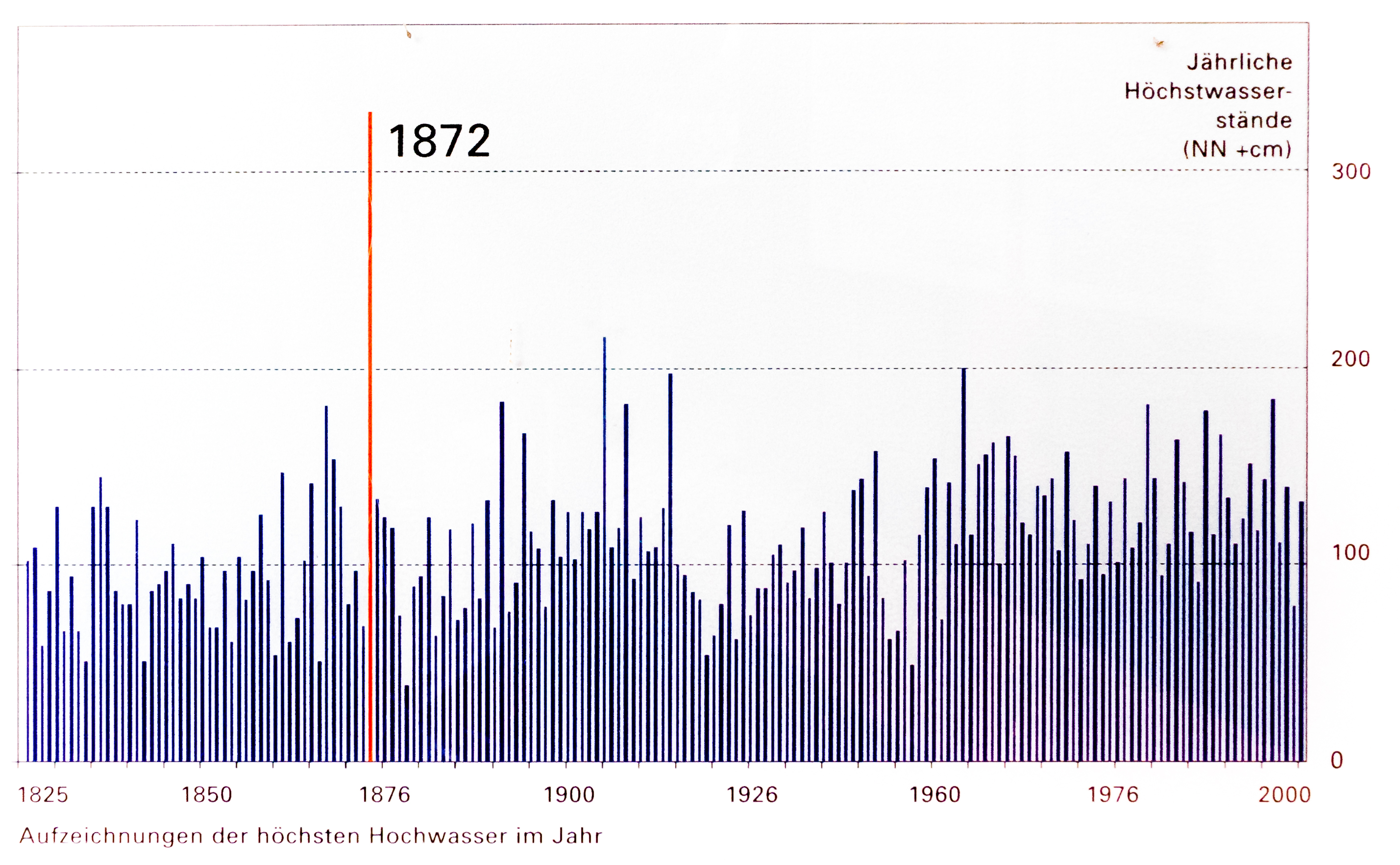 Schönberger Strand – Infopavillion Küstenschutz in Schleswig-Holstein